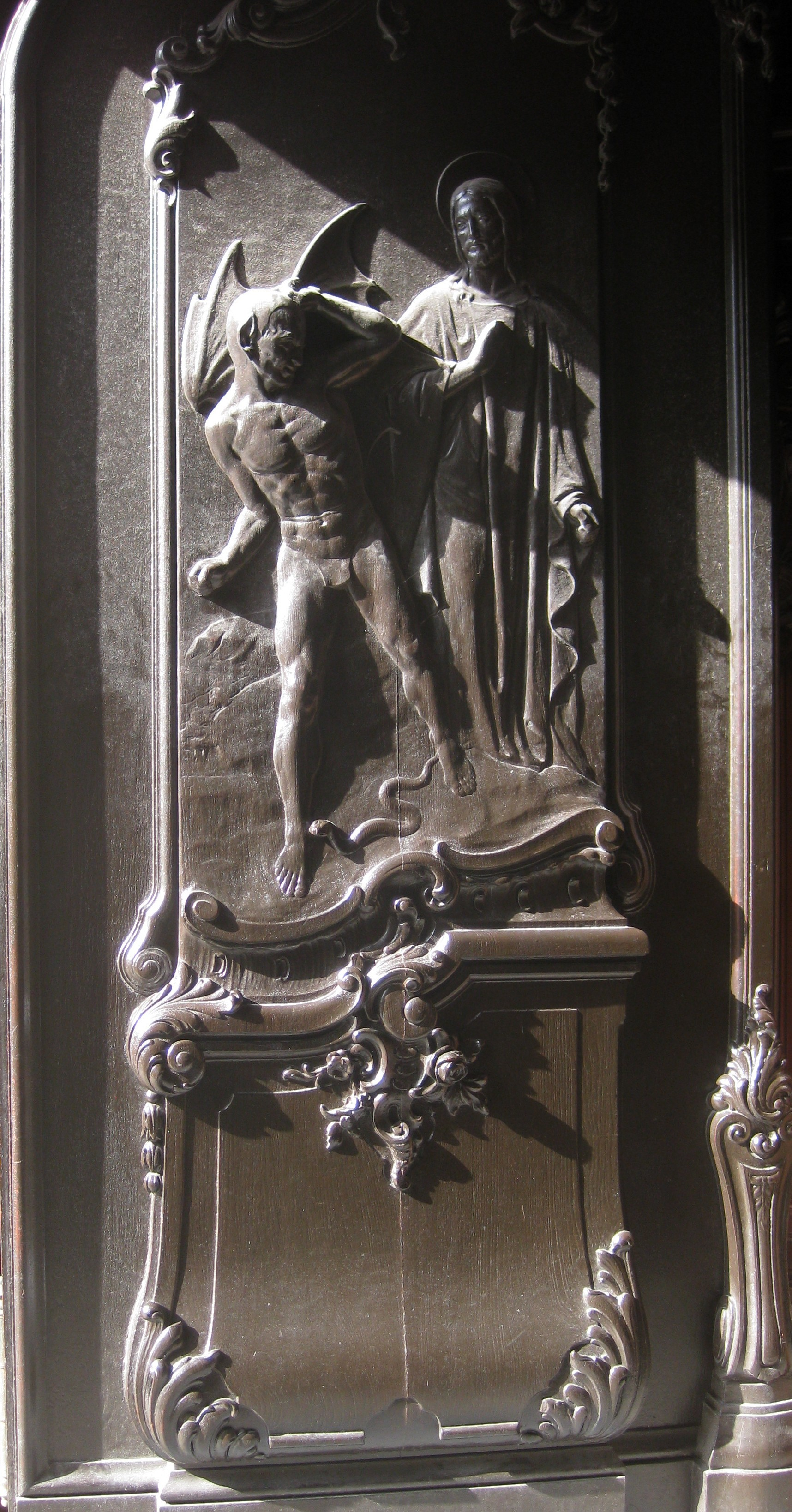 Vertreibung aus dem Paradies / Tür am Michel in Hamburg